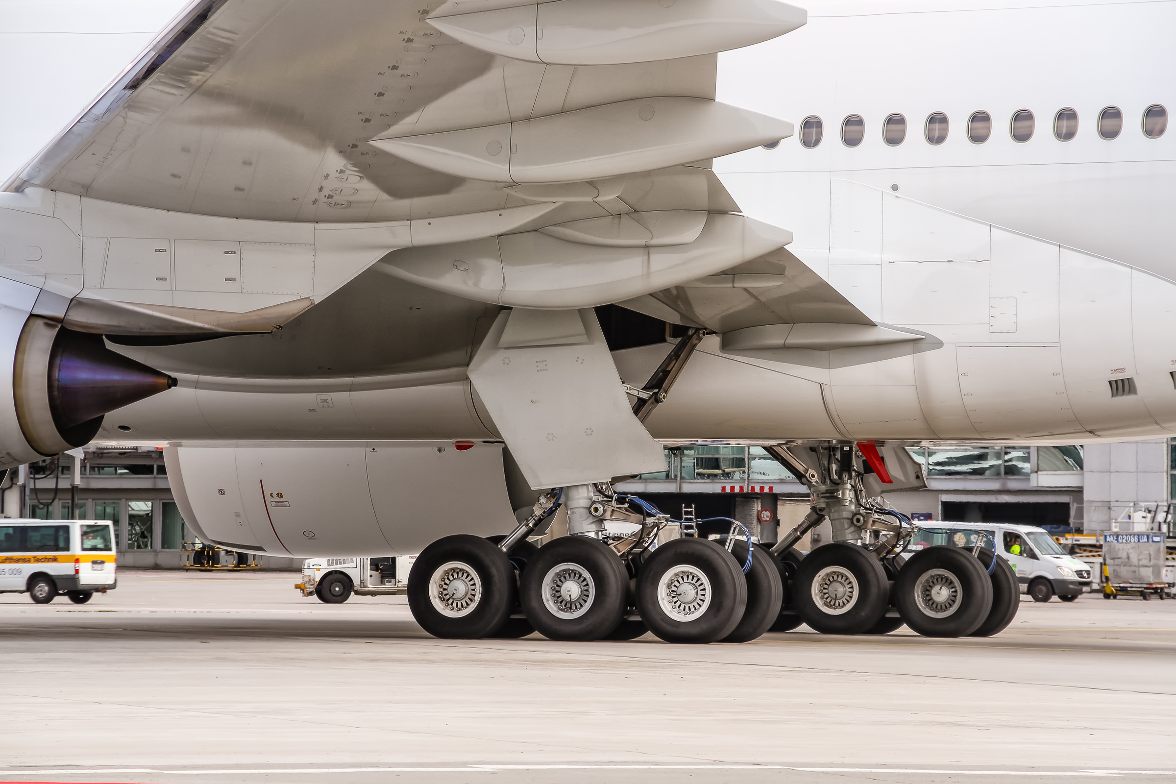 Tägliches Training und Vorbereitung der Abläufe für die Crew zwischen Zürich und Frankfurt, bevor damals die Tripple Seven der Swiss International Air Lines auf Langstrecke ging.